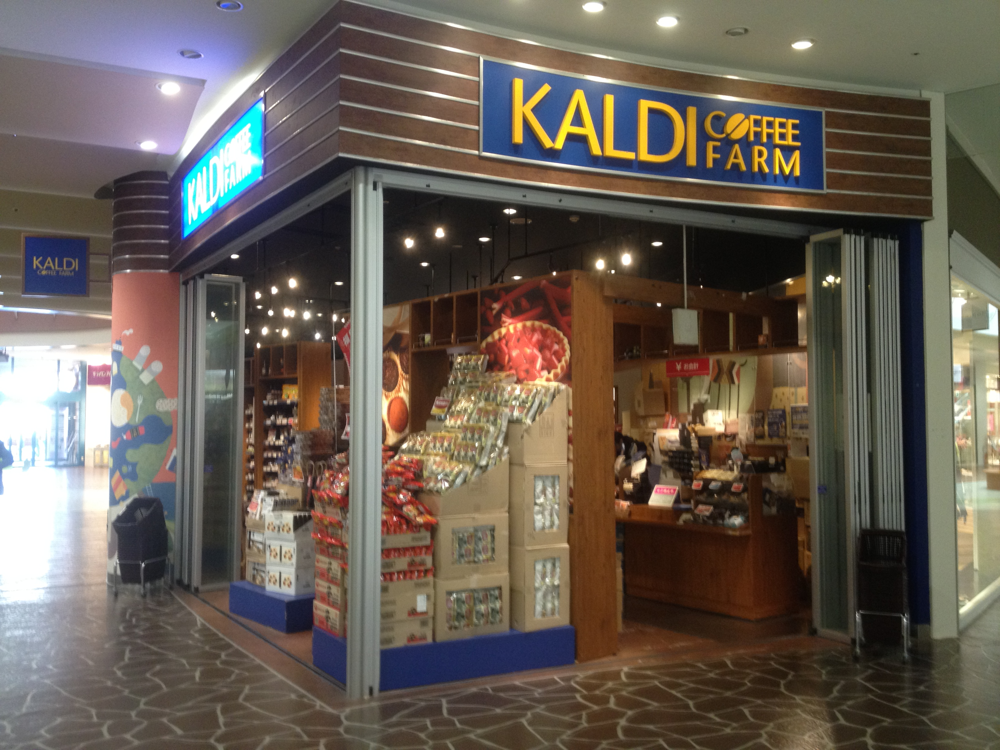 カルディコーヒーファーム名古屋みなと店